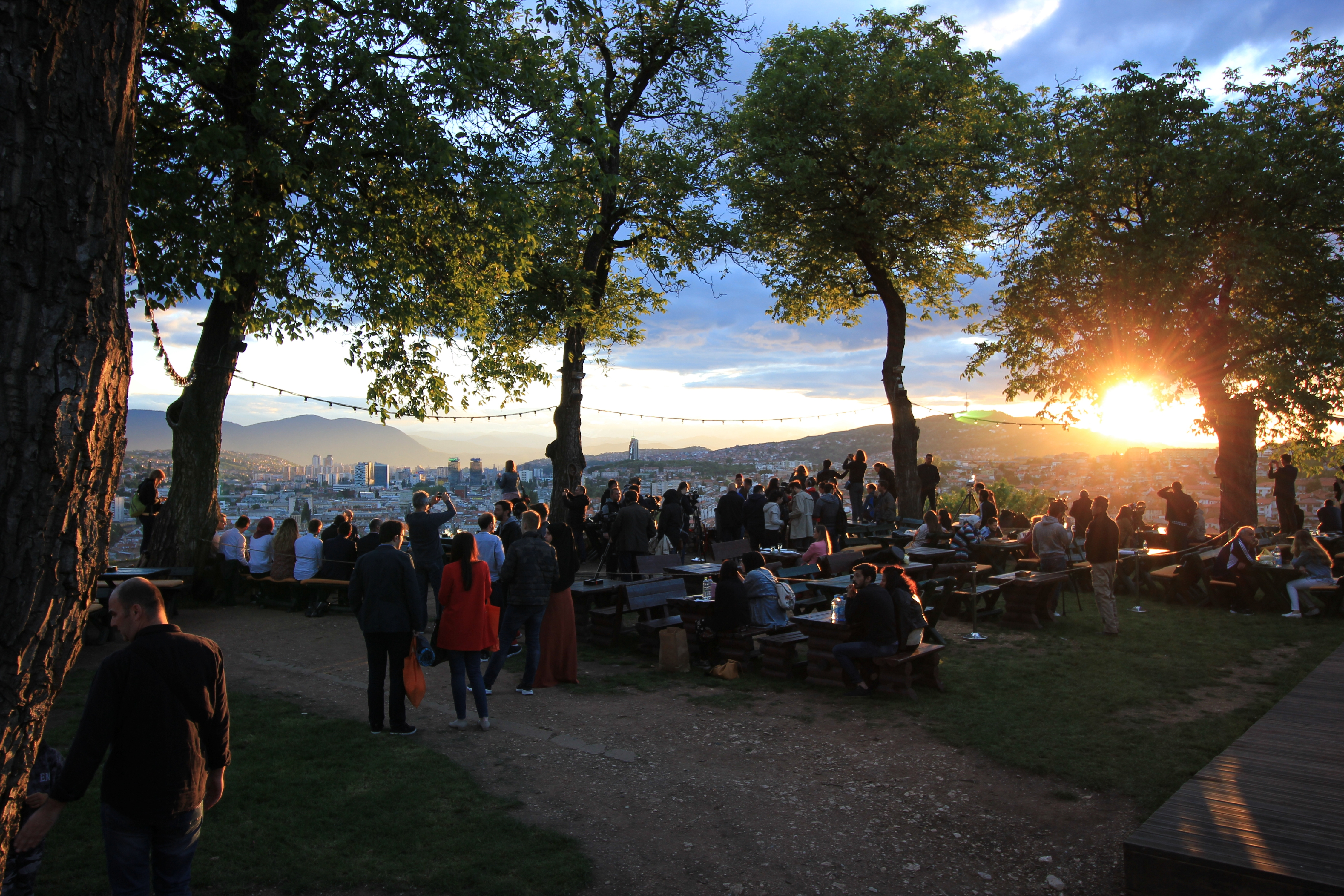 Gemeinsames Fastenbrechen am ersten Tag des Ramadan auf der Žuta tabija in Sarajevo